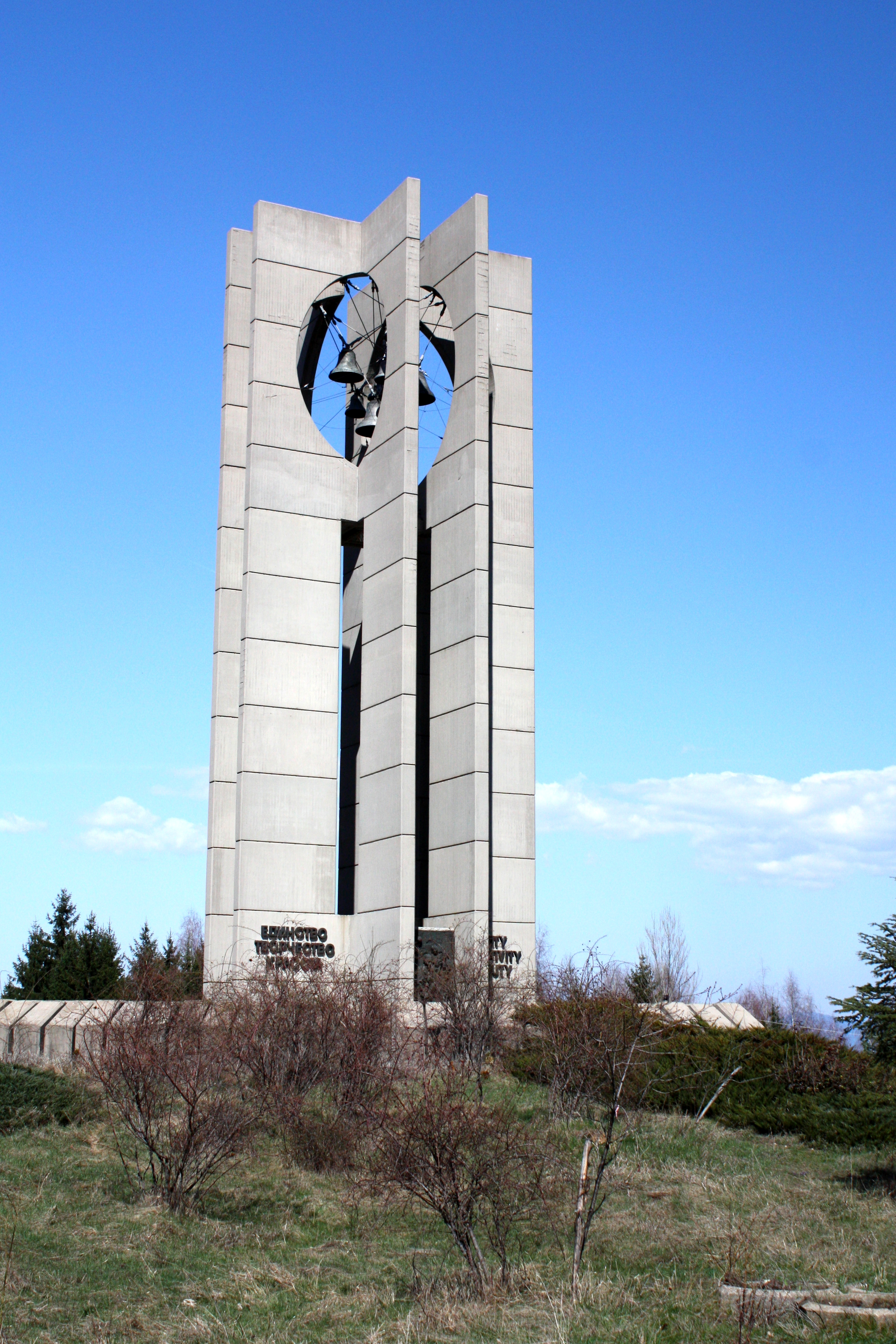 The bells, Die Glocken, Kambanite, Sofia, Bulgaria, Камбаните, София